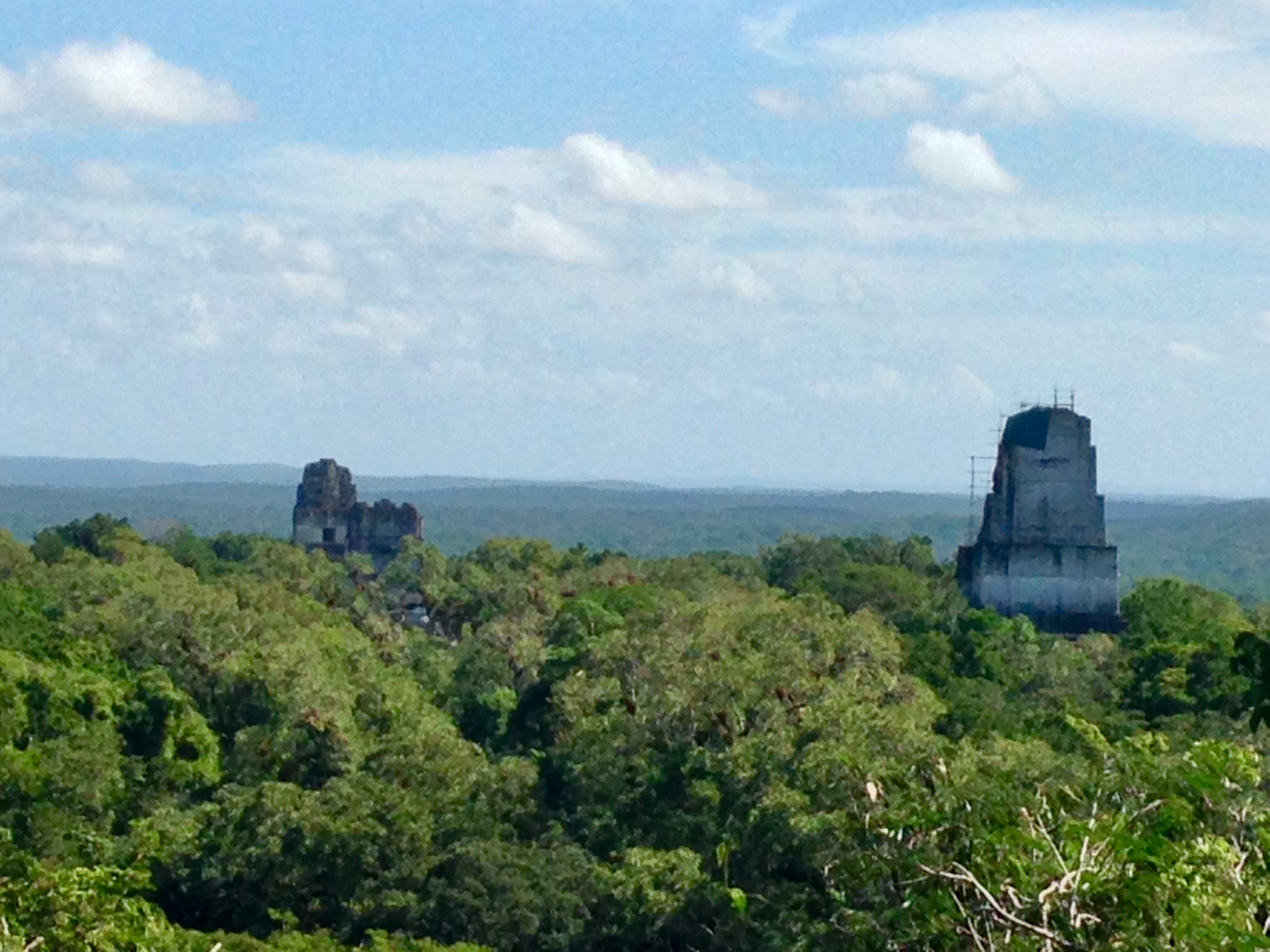 Vista de los templos I, II y III desde la cúspide del Templo IV. Parque Nacional Tikal, El Petén, Guatemala. Diciembre de 2015.